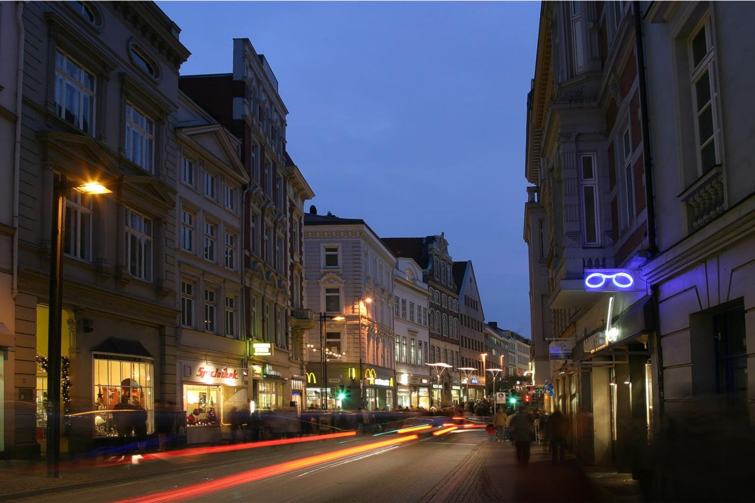 Breite Strasse between Fischergrube and Pfaffenstrasse, Luebeck (Germany)